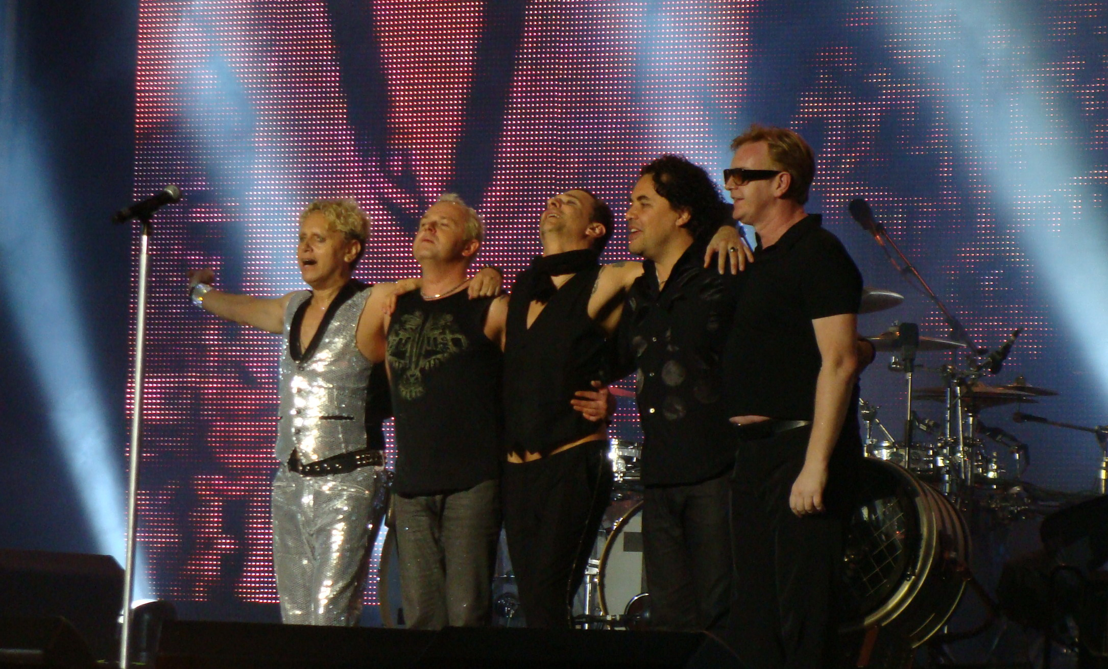 Depeche Mode en el Bilbao BBK Live 2009.